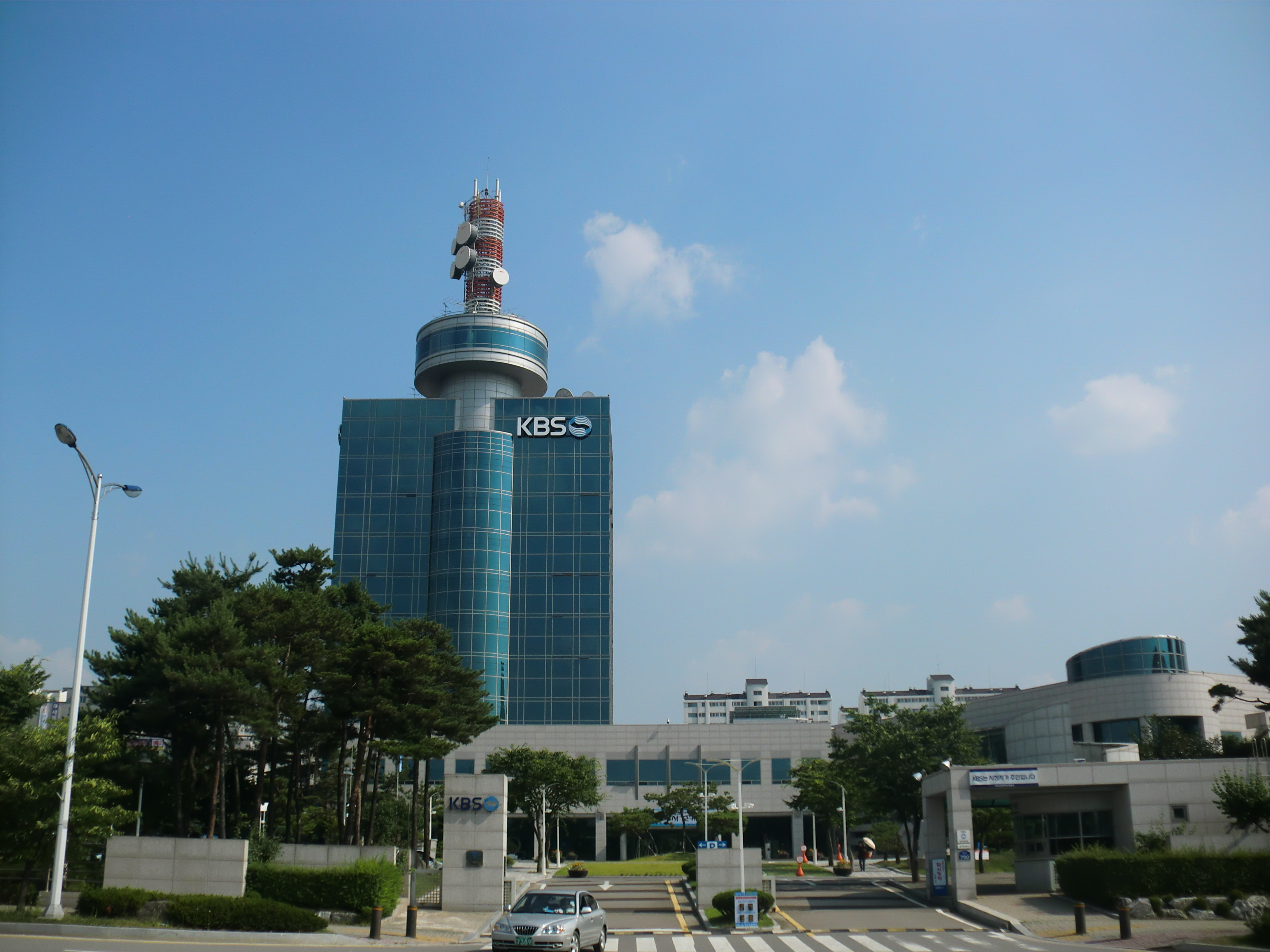 충청북도 청주시에 있는 한국방송공사 청주방송총국